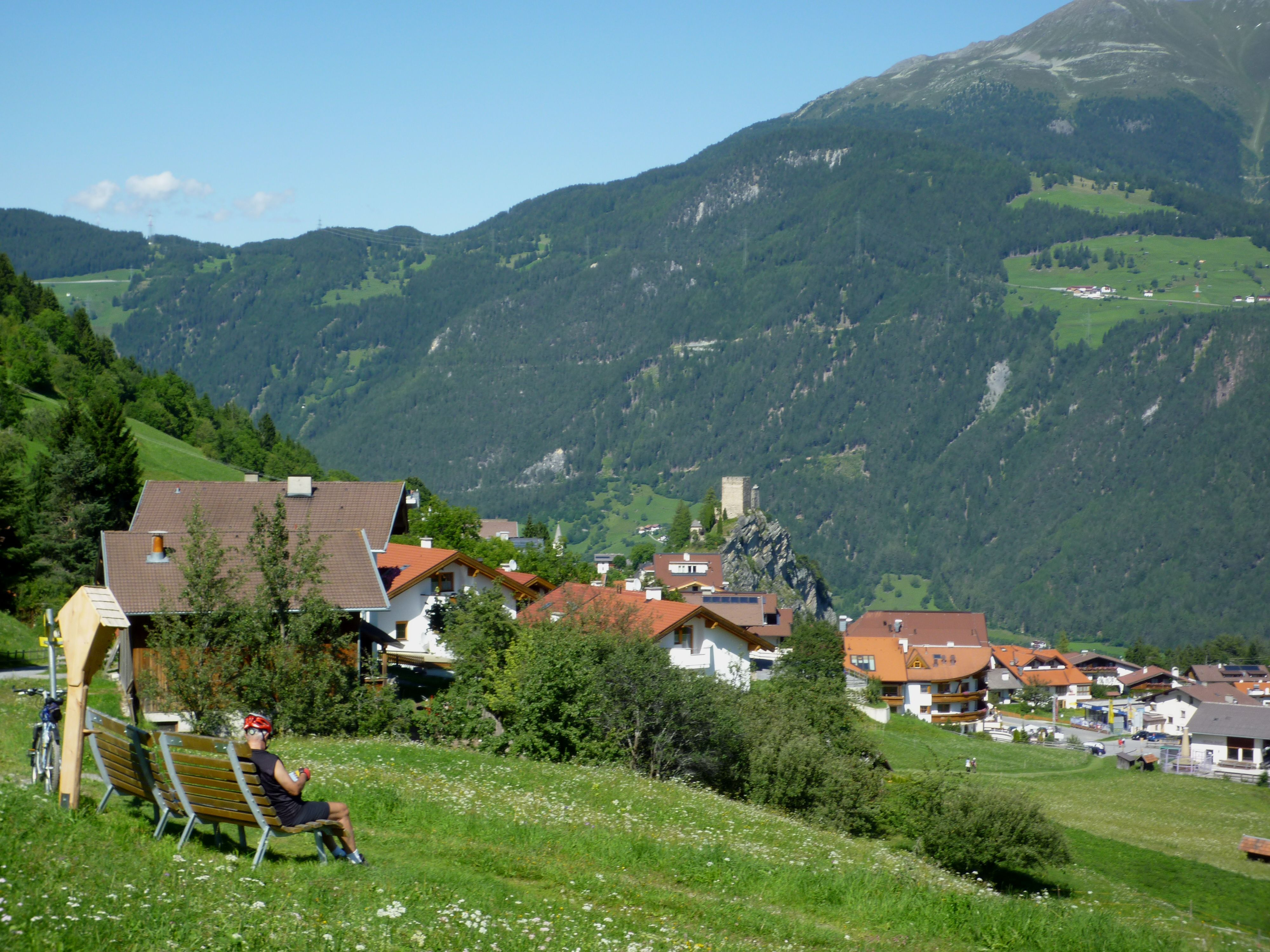 Ladis - Ort mit Burg Laudegg von Südwest